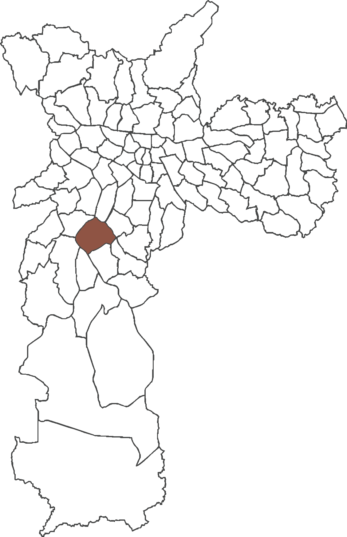 Localização do distrito de Santo Amaro no município de São Paulo.